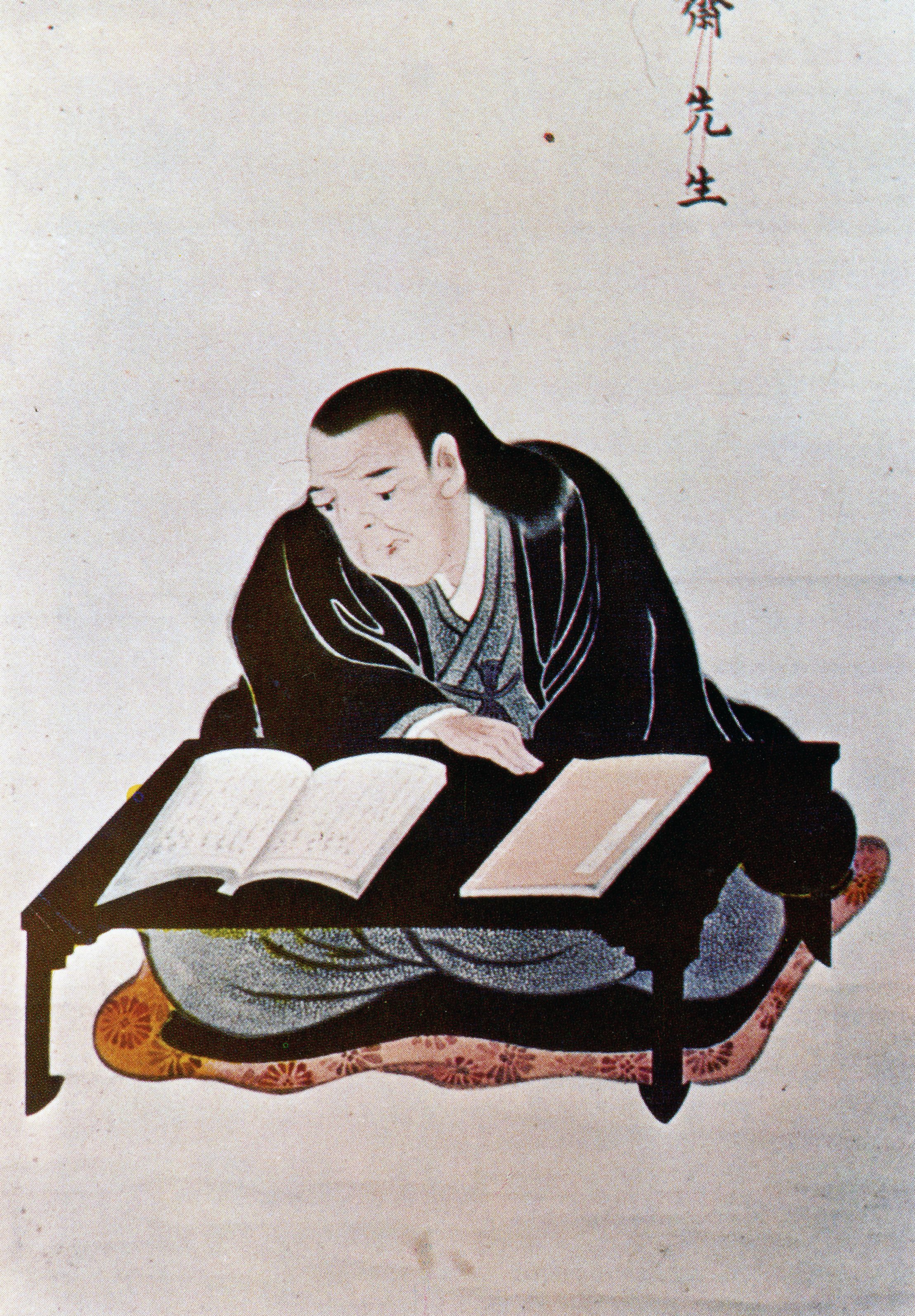 橋本宗吉肖像画